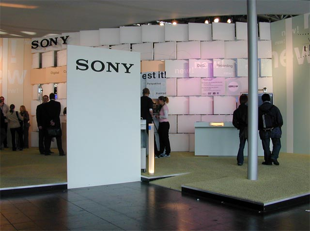 Cebit sony展台，照片是我拍的，upload:Lzy100 25 September 2005 21:44(UTC)。